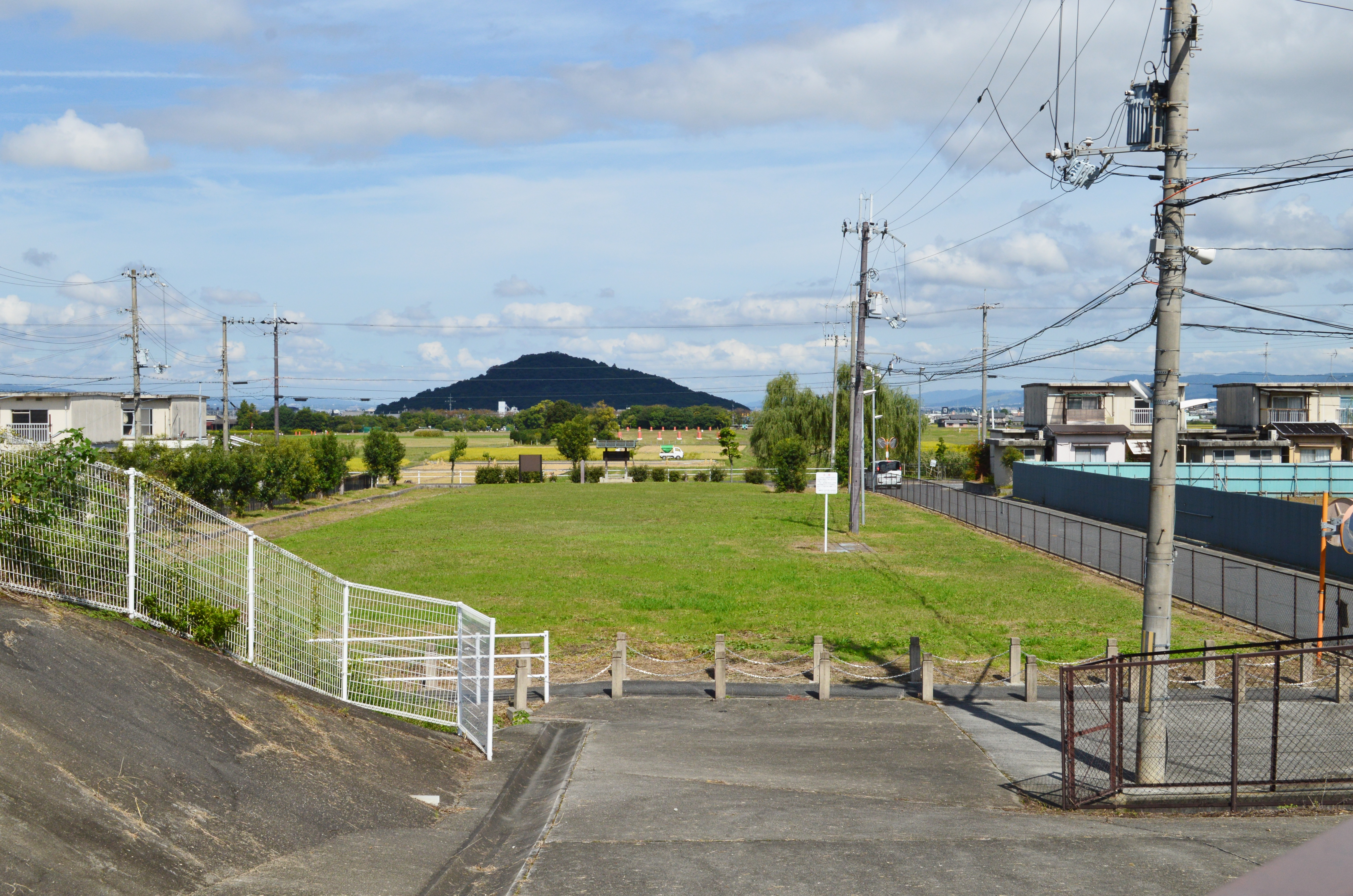 藤原京跡 朱雀大路